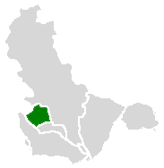 福州市区中鼓楼区（绿色）]的位置